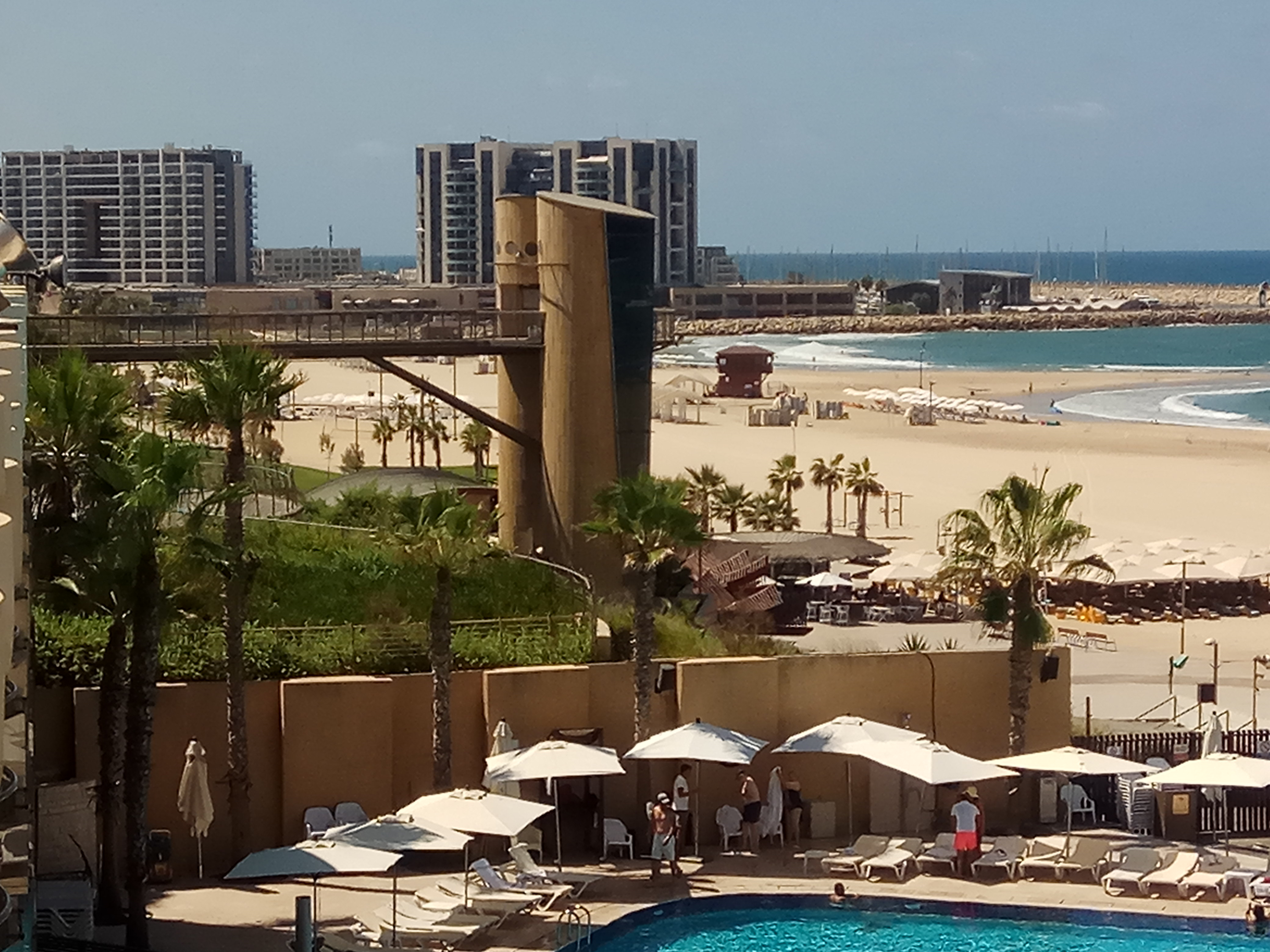 מעלית לחוף הרצליה